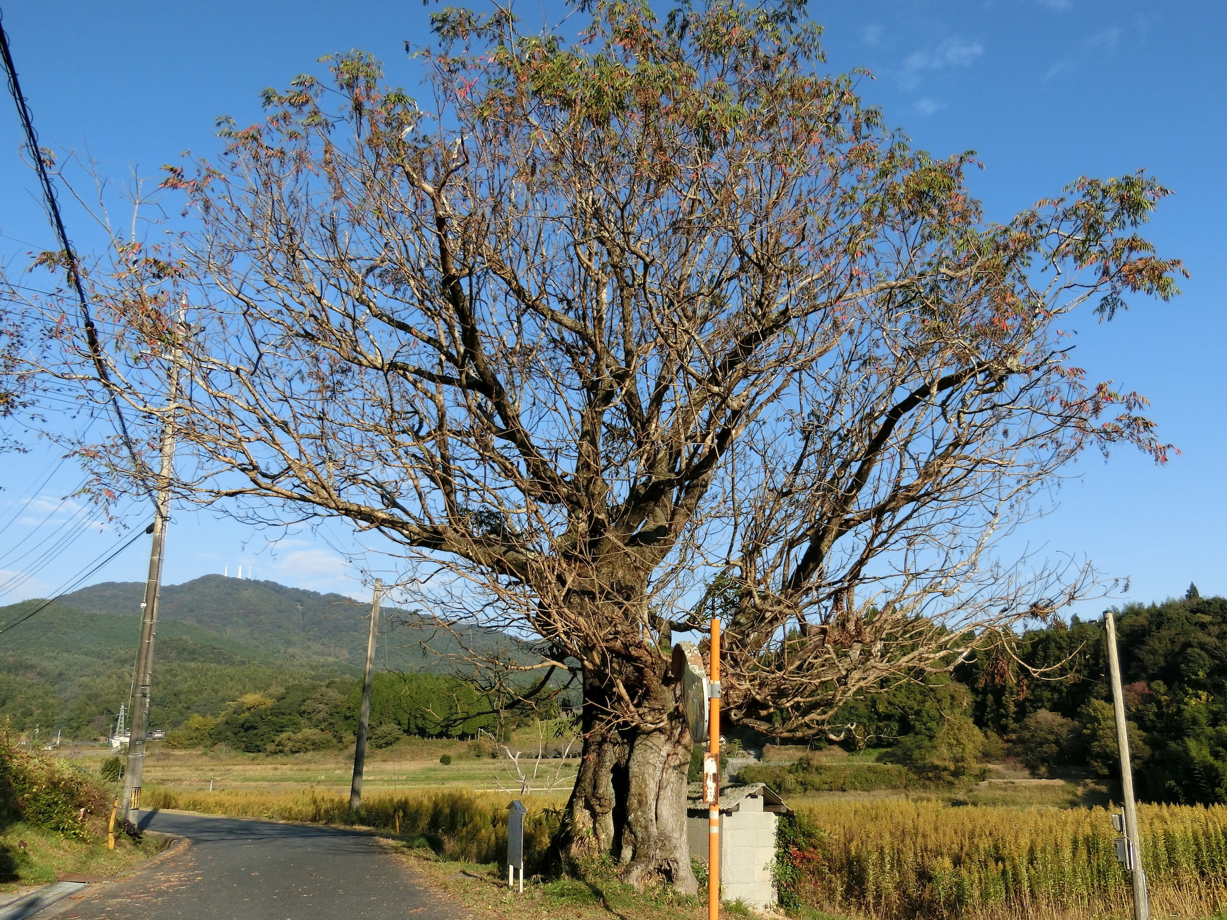 山口県指定天然記念物の宿井のハゼノキ（田布施町）。